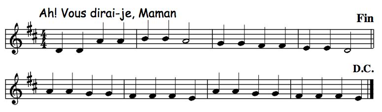 Ah! vous dirai-je, Maman (partition)